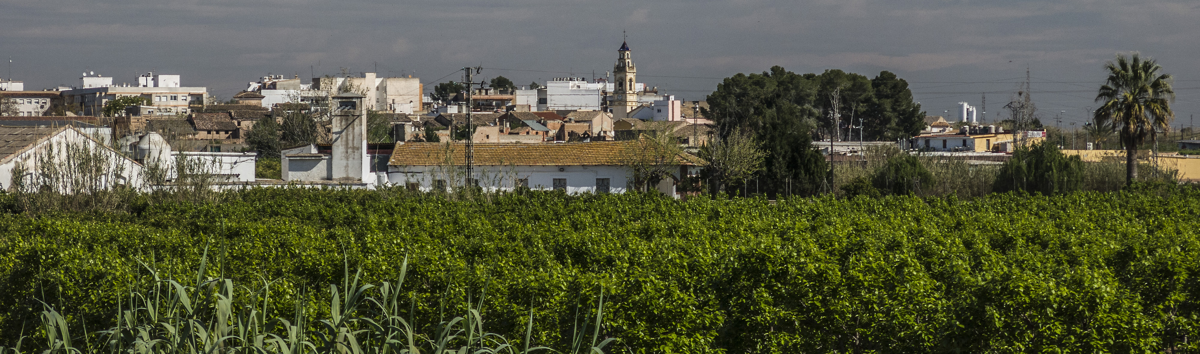 Municipi del País Valencià, situat a la comarca de la Ribera Alta. Aquesta imatge ha sigut publicada en: País Valencià poble a poble, Massalavés, 30-06-2017